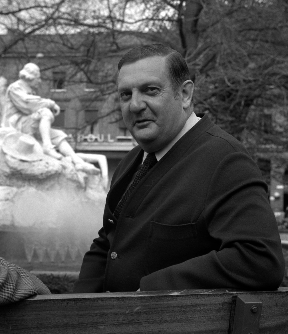 Jardin Pierre-Goudouli, place du Président-Thomas-Wilson. 4 avril 1975. Portrait de l'acteur et metteur en scène Jacques Charon, assis sur un banc discutant avec un homme (journaliste?), réalisé à l'occasion de la représentation de la pièce "Le Malade imaginaire" de Molière au Théâtre Sorano, qu'il interprète et met en scène. Observation: Dans cette version de la pièce "Le Malade imaginaire" produite par les Galas Karsenty-Herbert, Jacques Charon est aux côtés de Liliane Sorval, Nicole Mironze, Jean Marsan, Albert Rieux, Jean-Pierre Barlier, Philippe Beglia, Jean-Luc Tardieu, Marifa Danset et Alain Villeneuve.